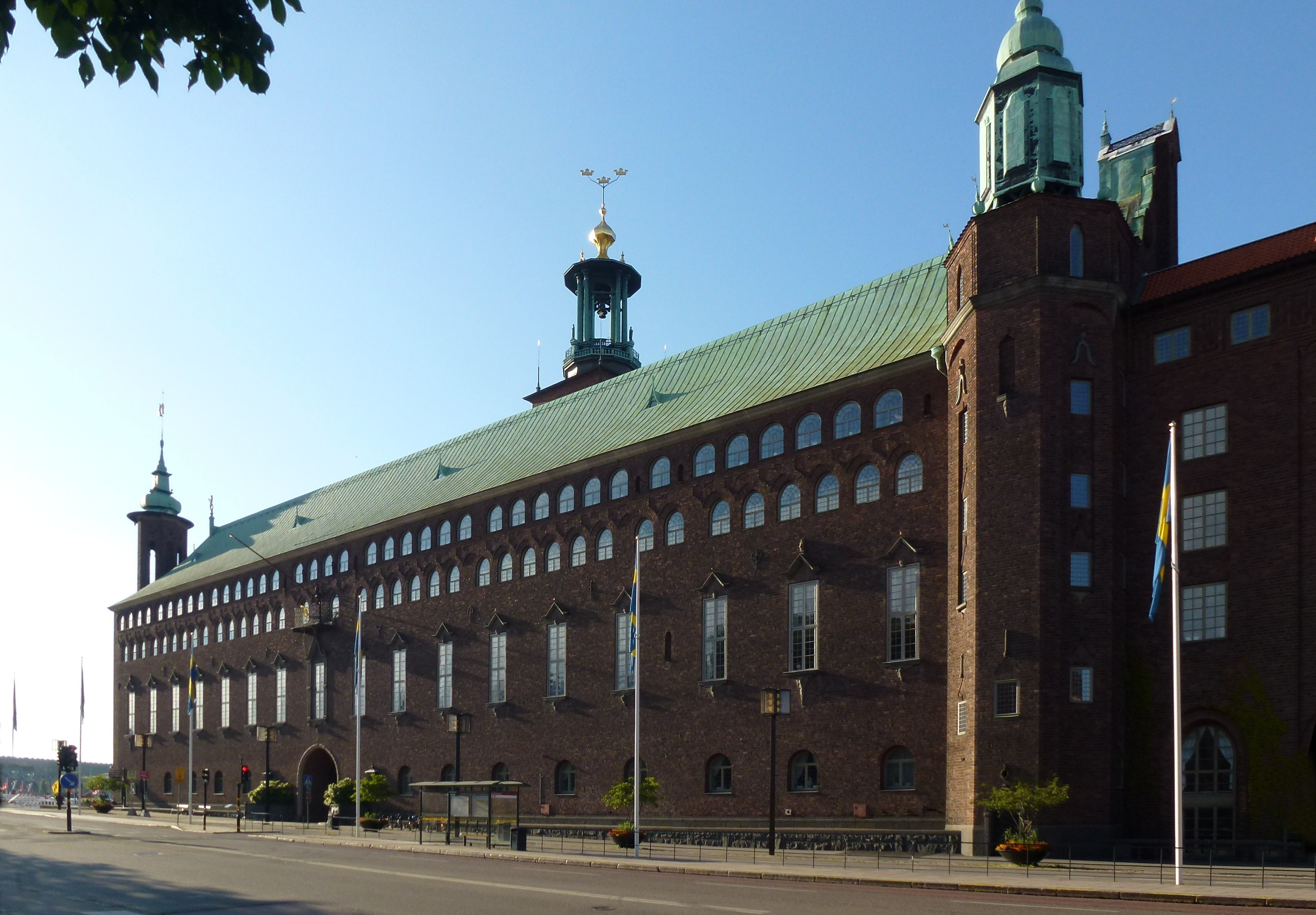 Stadshuset, fasad mot norr